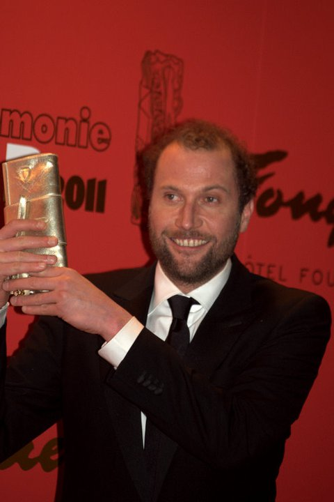 François Damiens à la cérémonie des César du cinéma